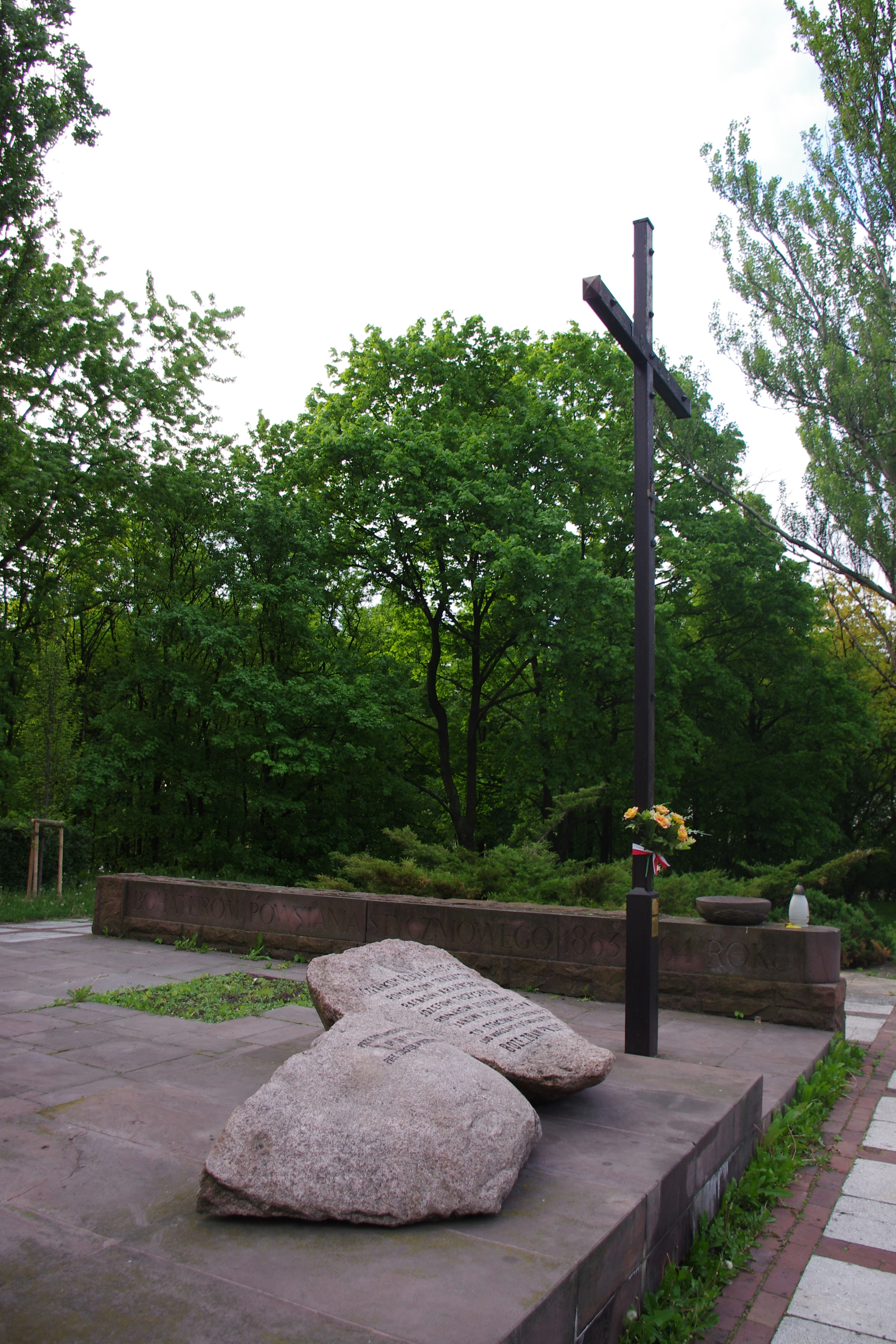 Kamień upamiętniający straconych członków Rządu Narodowego w powstaniu styczniowym: Romualda Traugutta, Rafała Krajewskiego, Józefa Toczyńskiego, Romana Żulińskiego i Jana Jeziorańskiego odsłonięty 5 sierpnia 1916 r., w Parku im. Romualda Traugutta w Warszawie